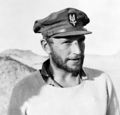 Robert Mayne, cofundador del SAS